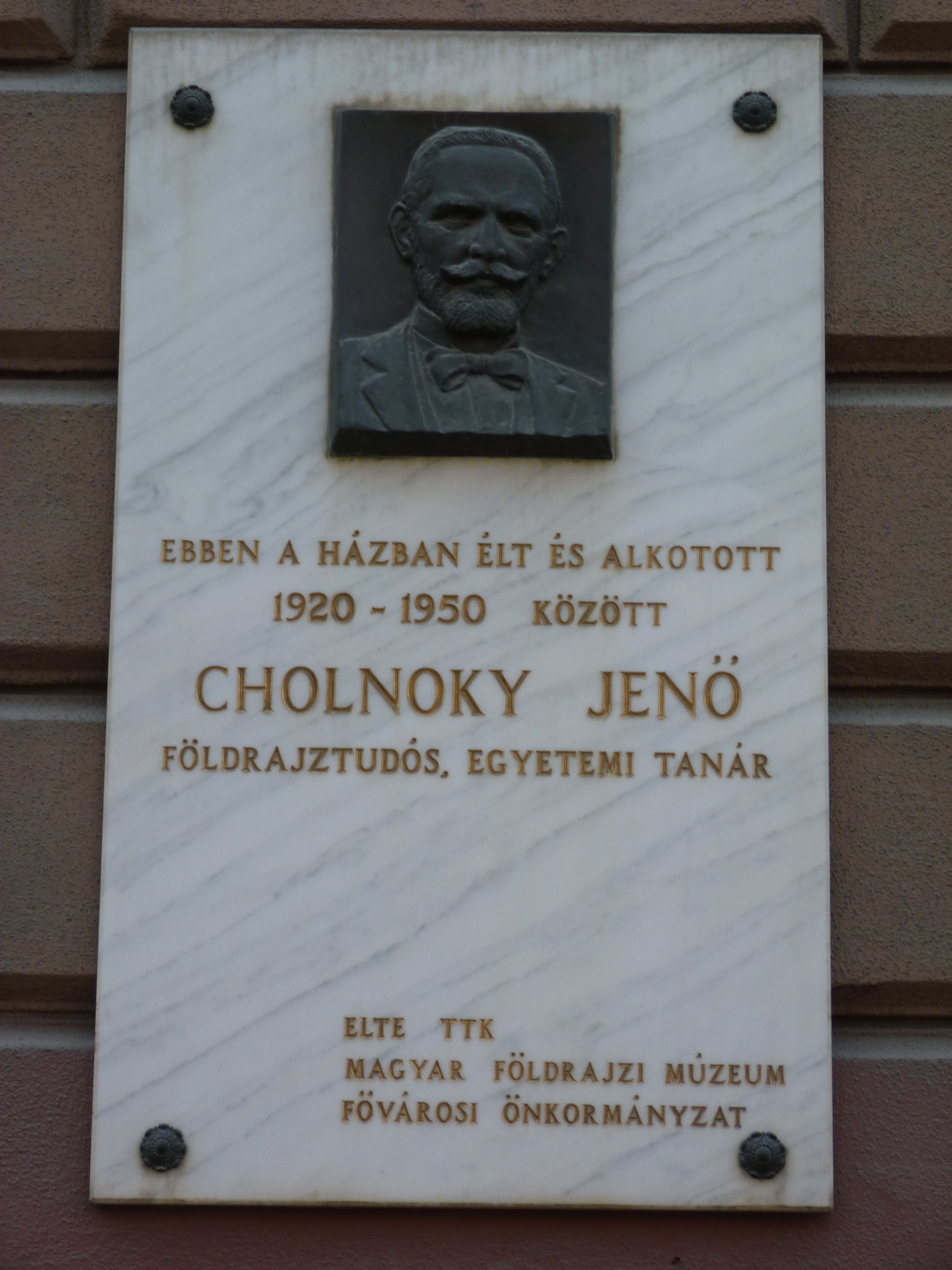 Cholnoky Jenő földrajztudós, egyetemi tanár emléktáblája Budapesten, a józsefvárosi Gyulai Pál utcában. Itt lakott 1920 és 1950 között.